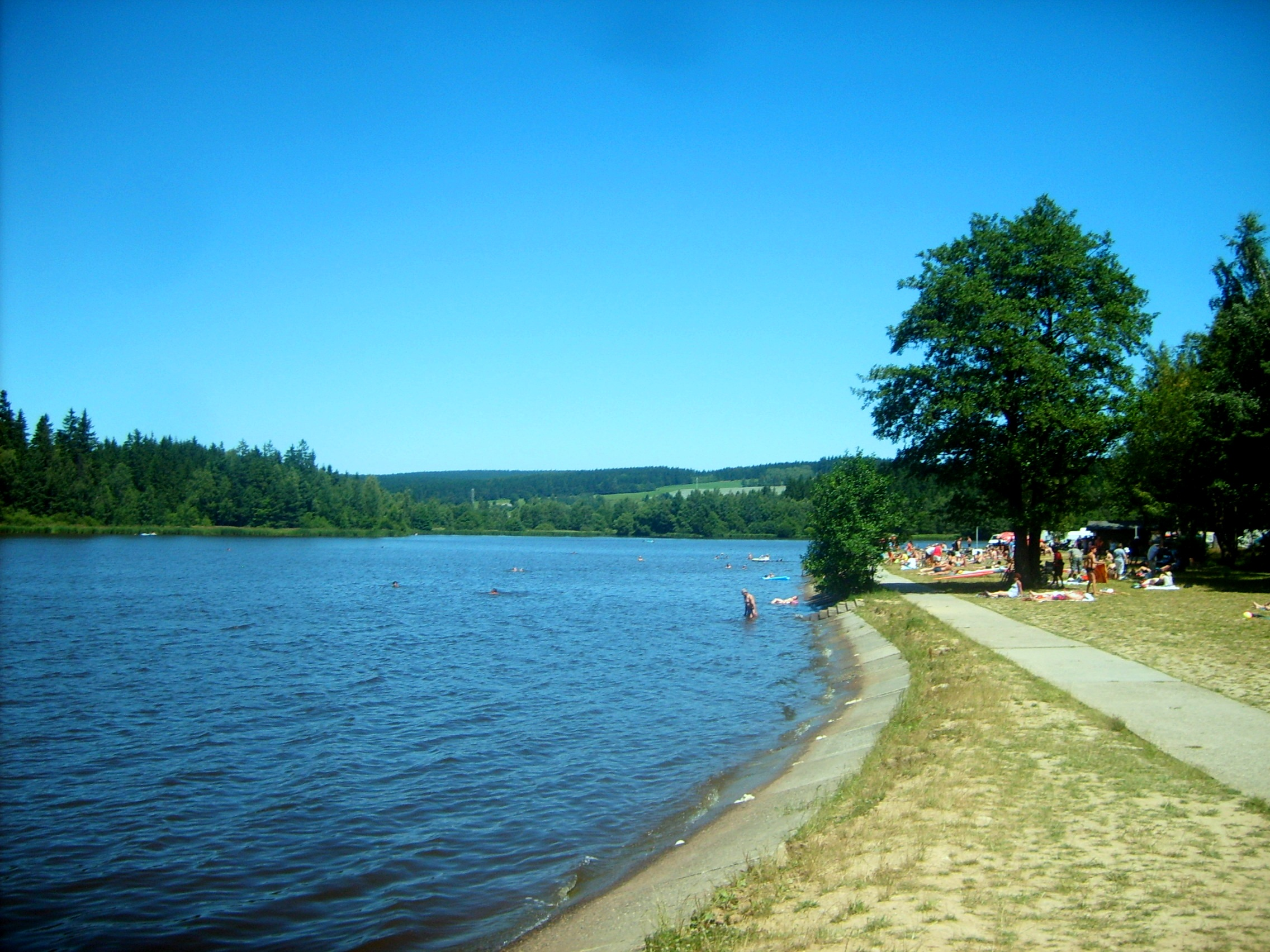 Pláž rybníka Velké Dářko na řece Sázavě na Žďársku.